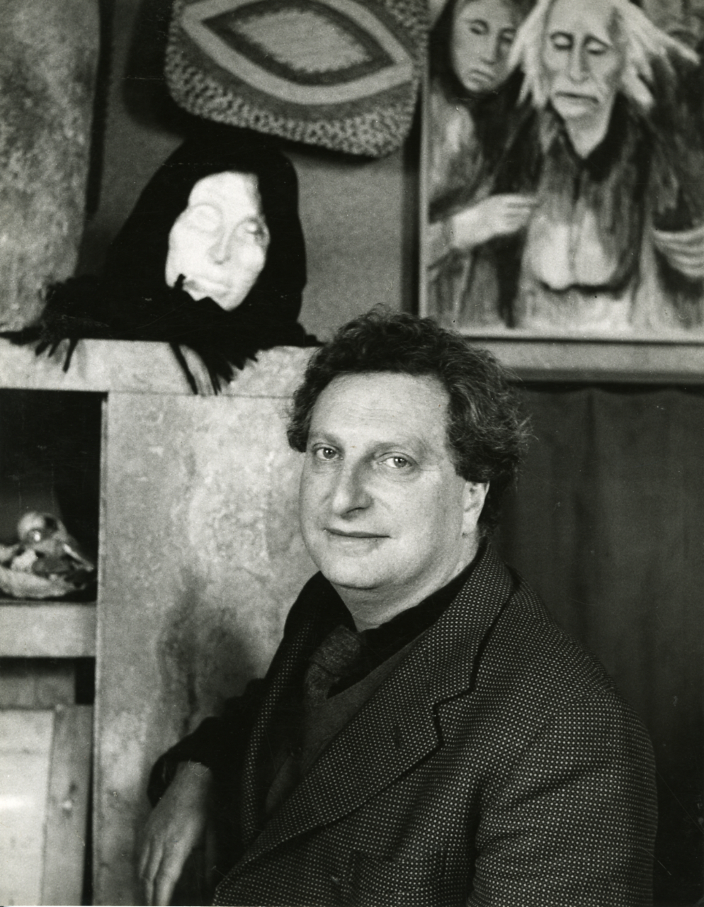 Località non identificata. Ritratto di Carlo Levi. Servizio fotografico : Italia, 1955 / Paolo Monti. - Stampe: 2 : Positivo b/n, gelatina bromuro d'argento/ carta, 24x30. - ((Al verso delle stampe manoscritto: "Carlo Levi 1955". Sul coperchio della scatola manoscritto: "Ritratti Artisti".